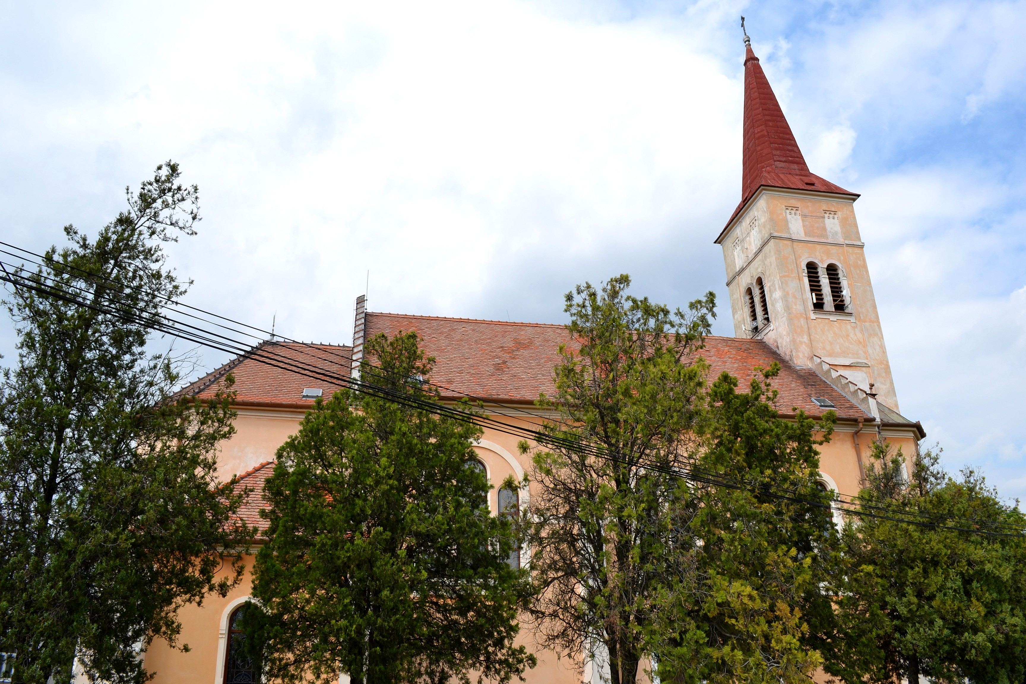 Čierny Brod (okr. Galanta), Kostol svätých Joachima a Anny